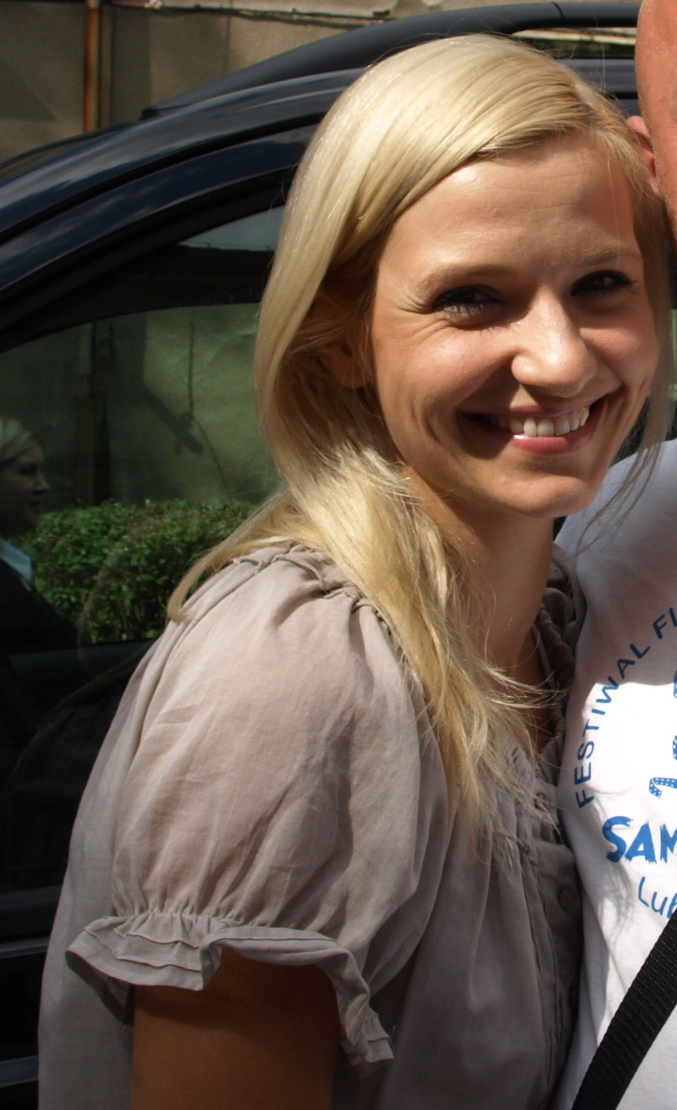 Joanna Koroniewska w 2011 roku